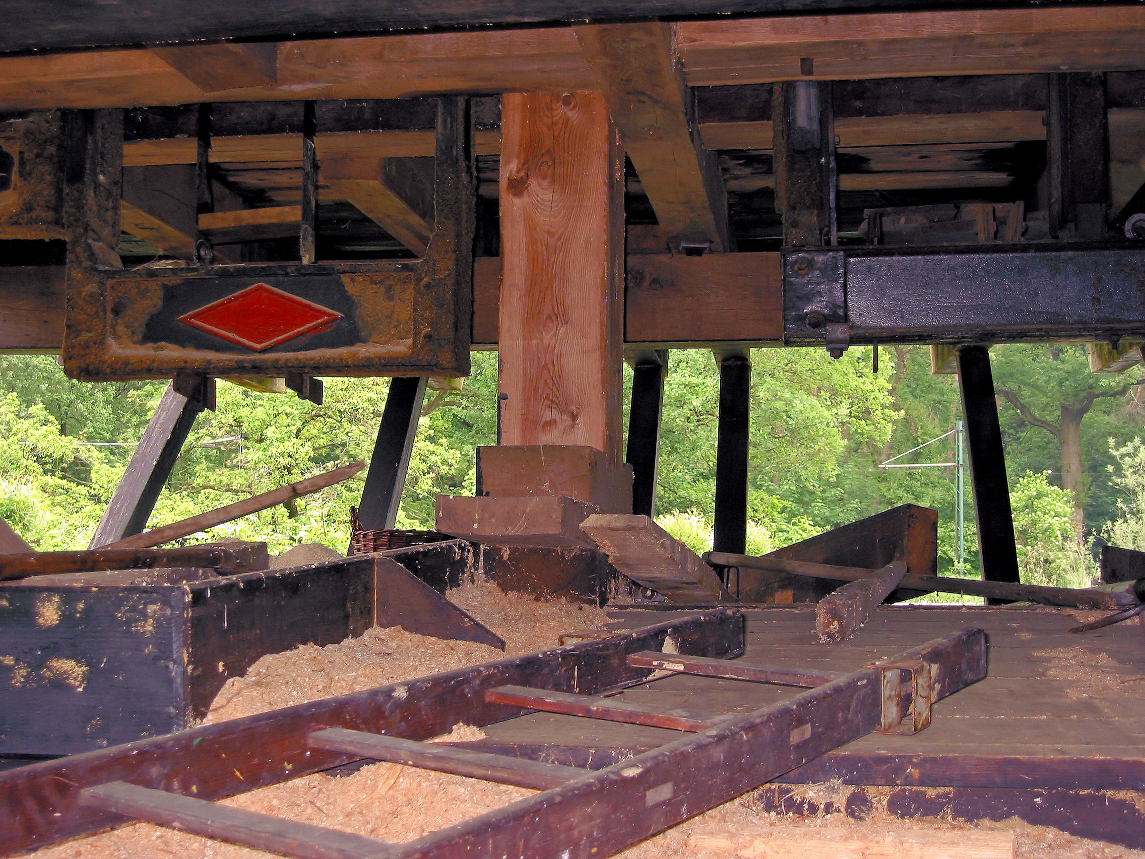 Paltrok molen, kot met zaagsel